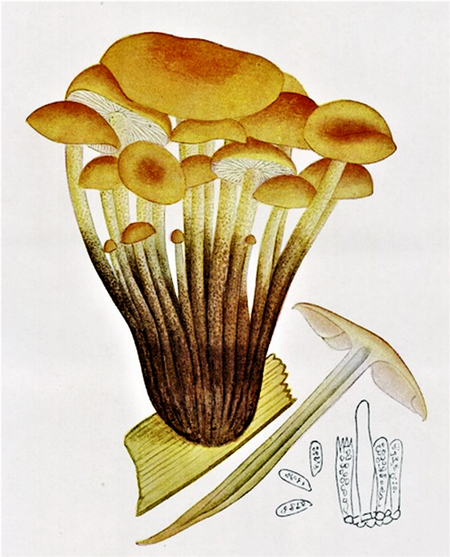 Bres.: Collybia velutipes (Curtis, 1782) P.Kumm. (1871), heute Flammulina velutipes (Curtis) Singer (1951)